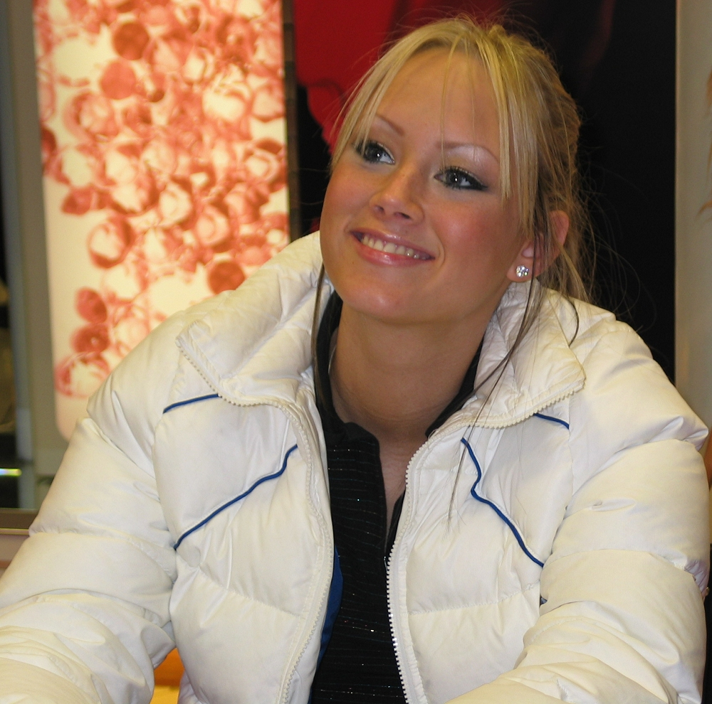 Bildbeschreibung: Natasha Thomas während einer Autogrammstunde * Quelle: selbst fotografiert * Fotograf/Zeichner: Medien-GbR.de (Benutzer:Medien-gbr, eigenes Foto) * Datum: 2004-11-26 * Sonstiges: ... (the red eyes effect fixed)